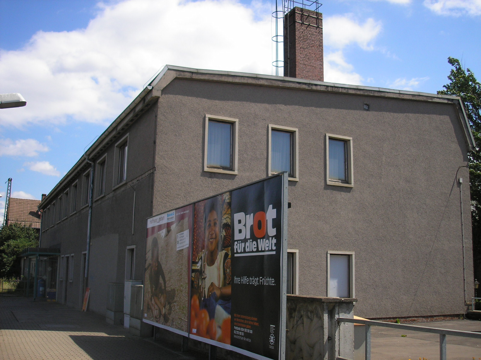 Das Bahnhofsgebäude von Neudietendorf (Thüringen).